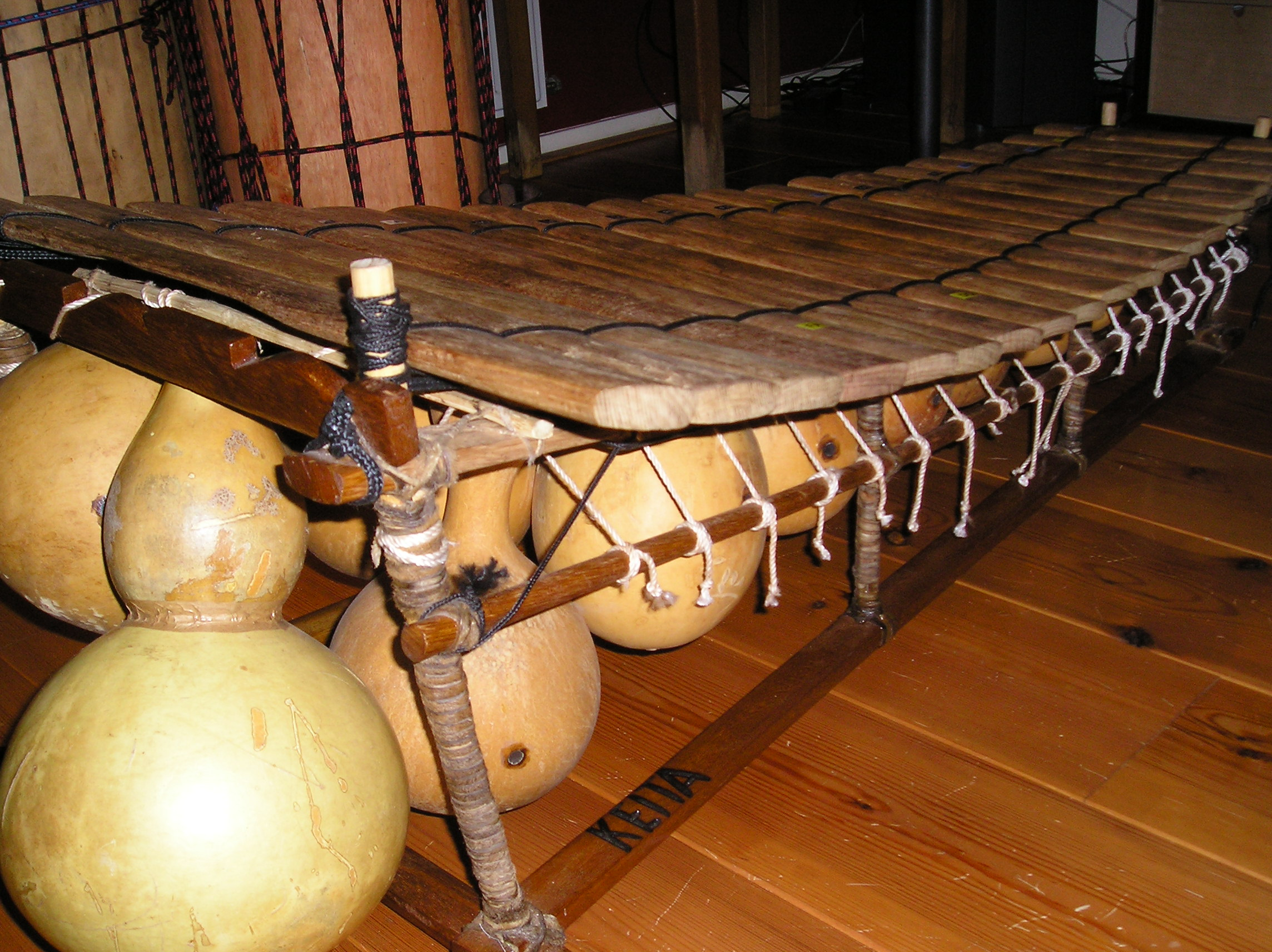 Een balafoon is een slaginstrument, afkomstig uit West-Afrika. Het instrument lijkt op een xylofoon. Zelfgemaakte foto.